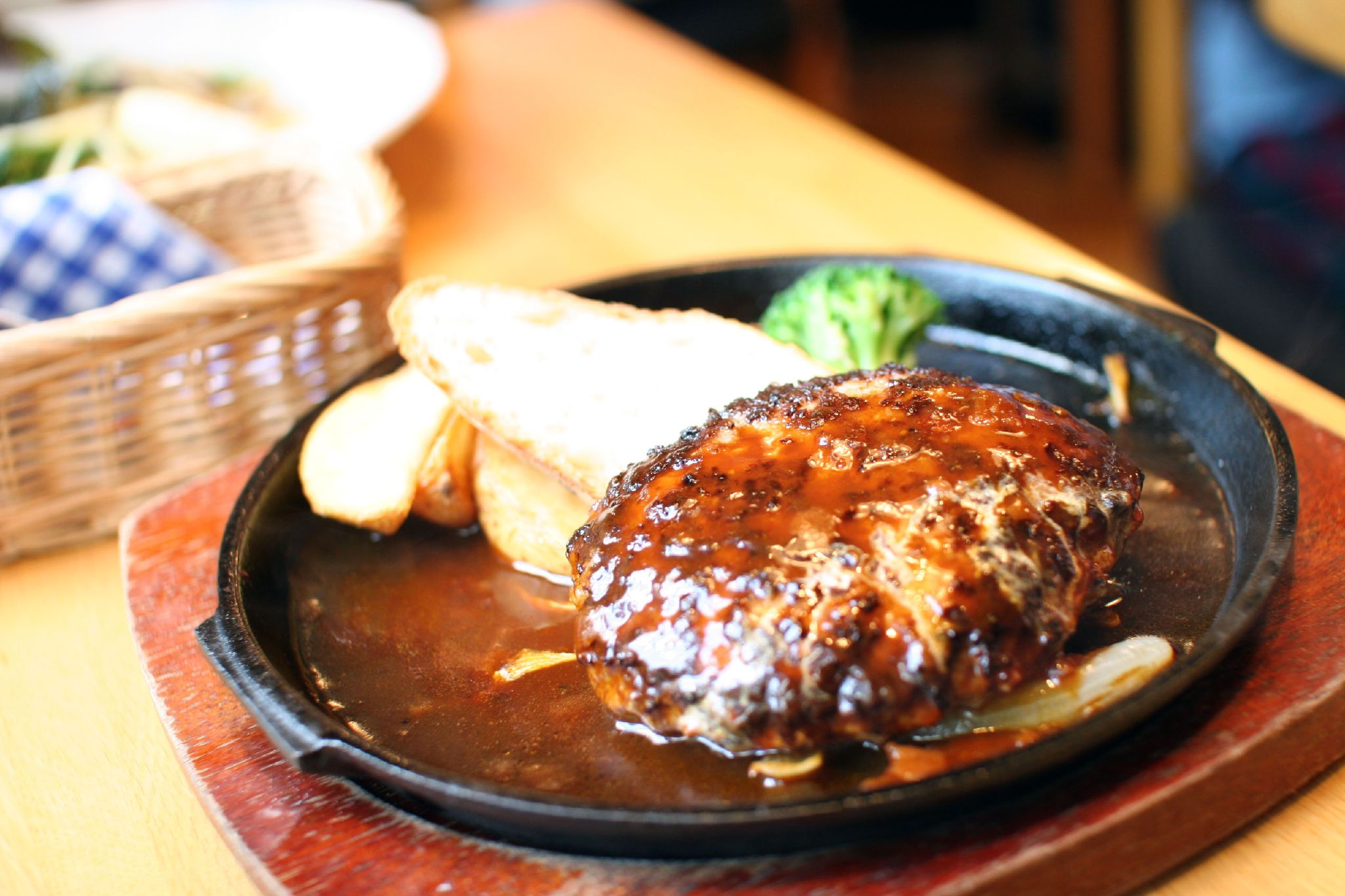 Hamburg steak